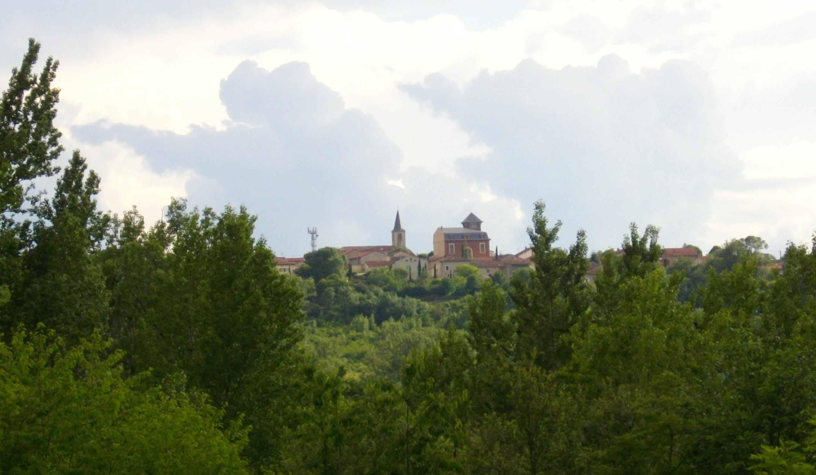 Vue sur Blaye-les-Mines, centre-ville.